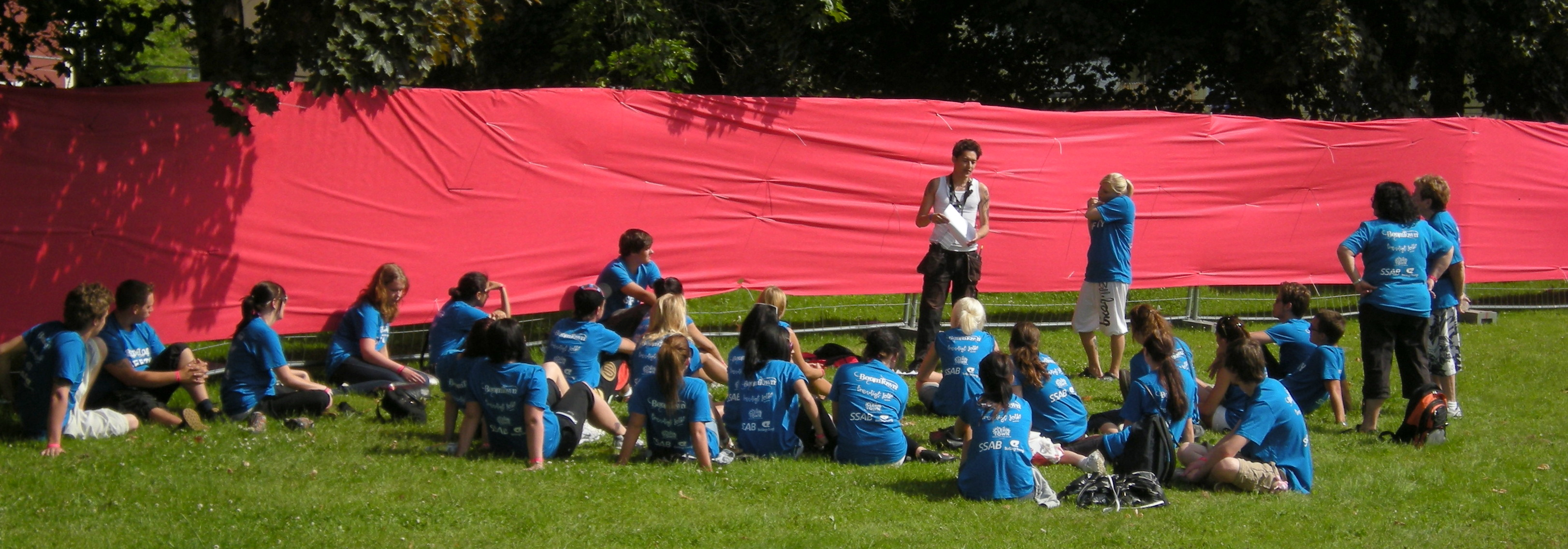 Från Peace and Love, utbildning av funktionärer, safety